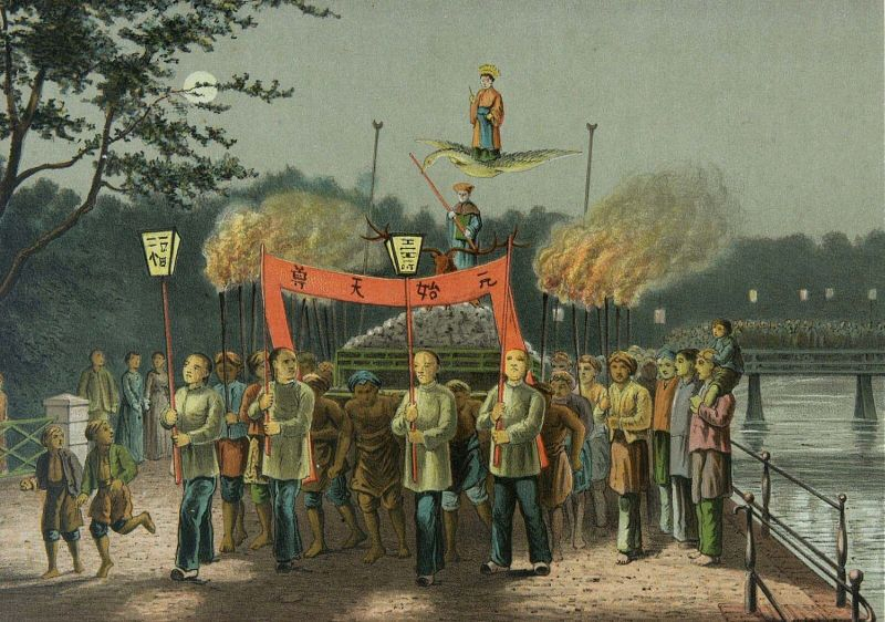 Litho. Kleurenlitho naar een oorspronkelijk werk van Rappard.. Optocht tijdens het Tjap Go Meh feest